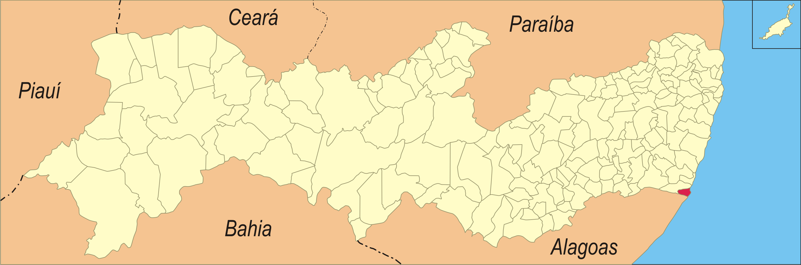 Localização da cidade em Pernambuco